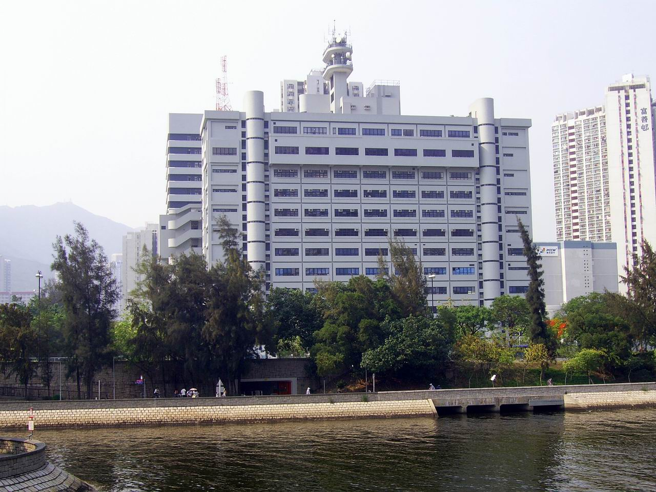 中文（香港）: 香港警務處新界北總區總部